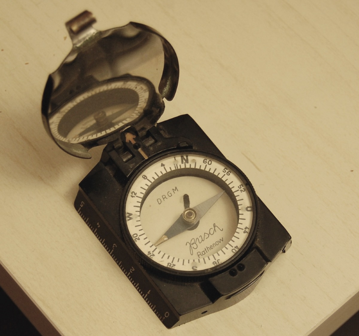 Die Kompasse der Emil Busch AG waren sehr solide, kompakt und leicht (70 g).